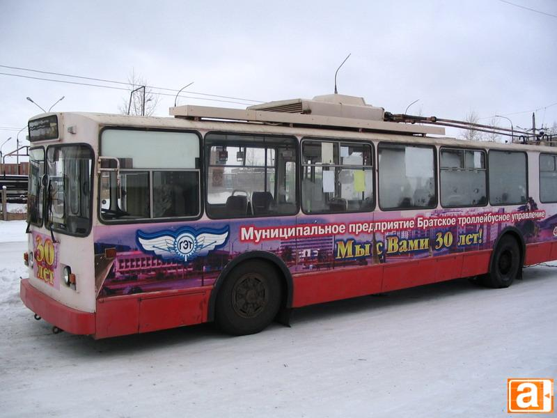 Троллейбус Братска, борт 57, ВМЗ-170